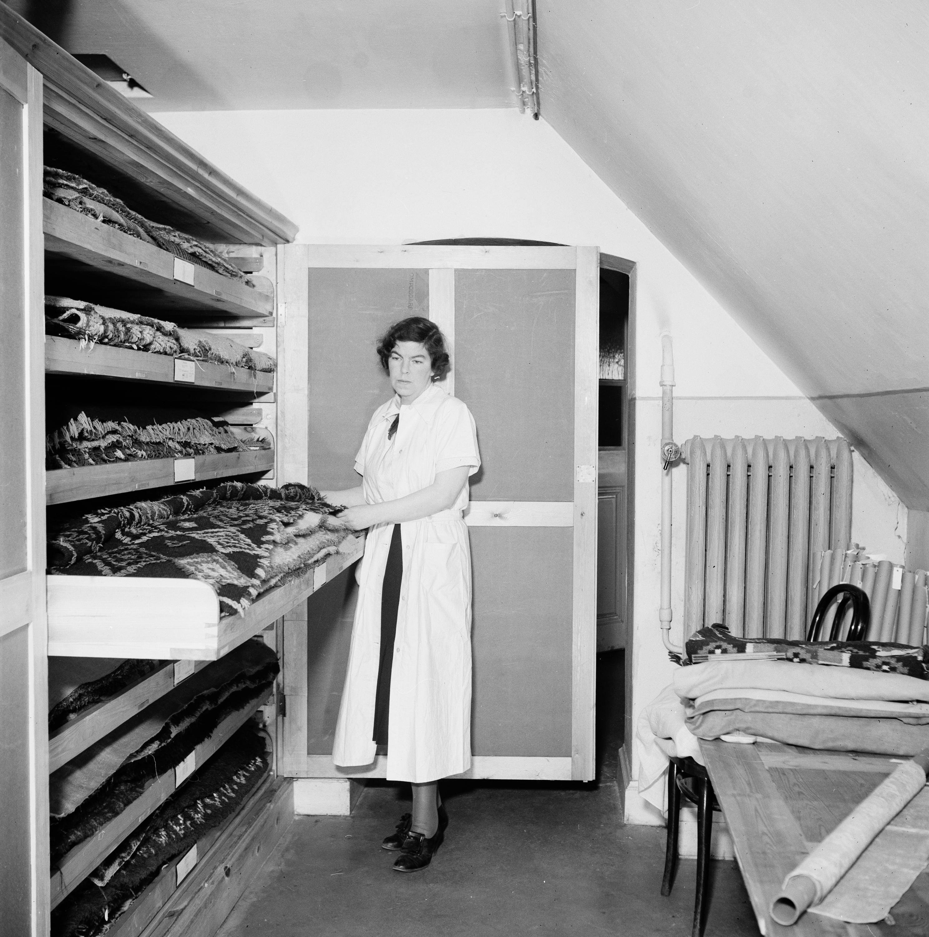 Porträtt av Elisabeth Strömberg, textilexpert på Nordiska museet som sedan övergick till Röhsska museet. Här står hon i magasin med museiföremål, textilier, förvarade i lådor.